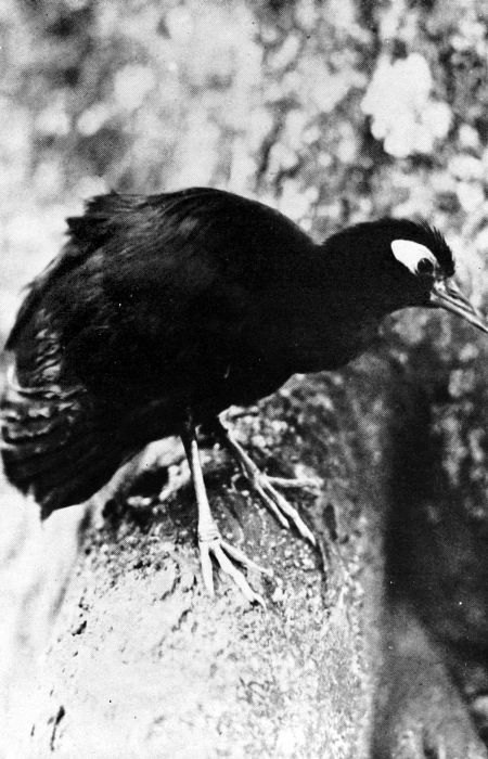 Repronegatief. Levend exemplaar van een sulawesinaaktoogral,Gymnocrex rosenbergii (Schlegel, 1866)